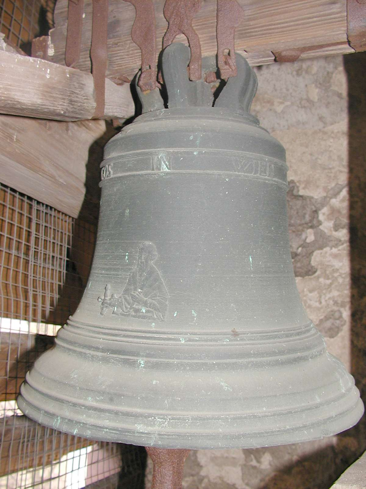 Älteste Glocke der Pfarrkirche Frauendorf